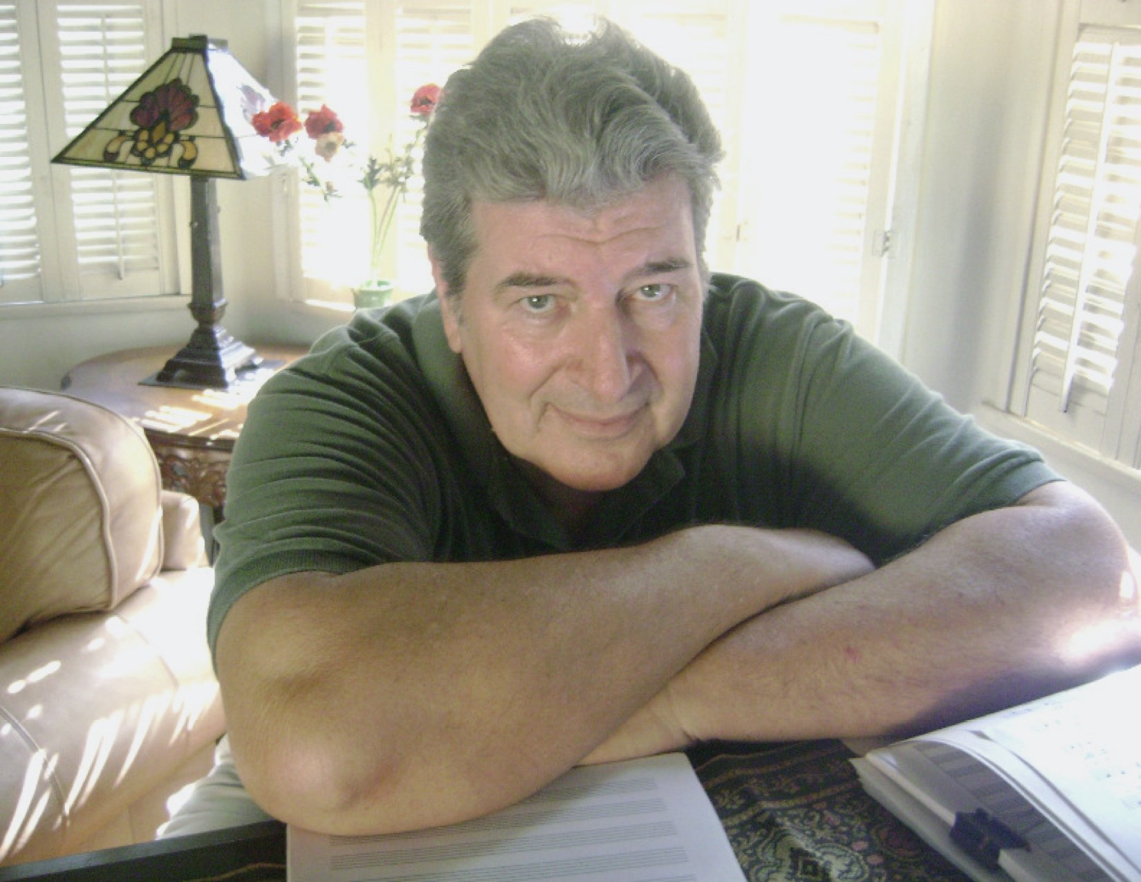 Dale Oehler at home